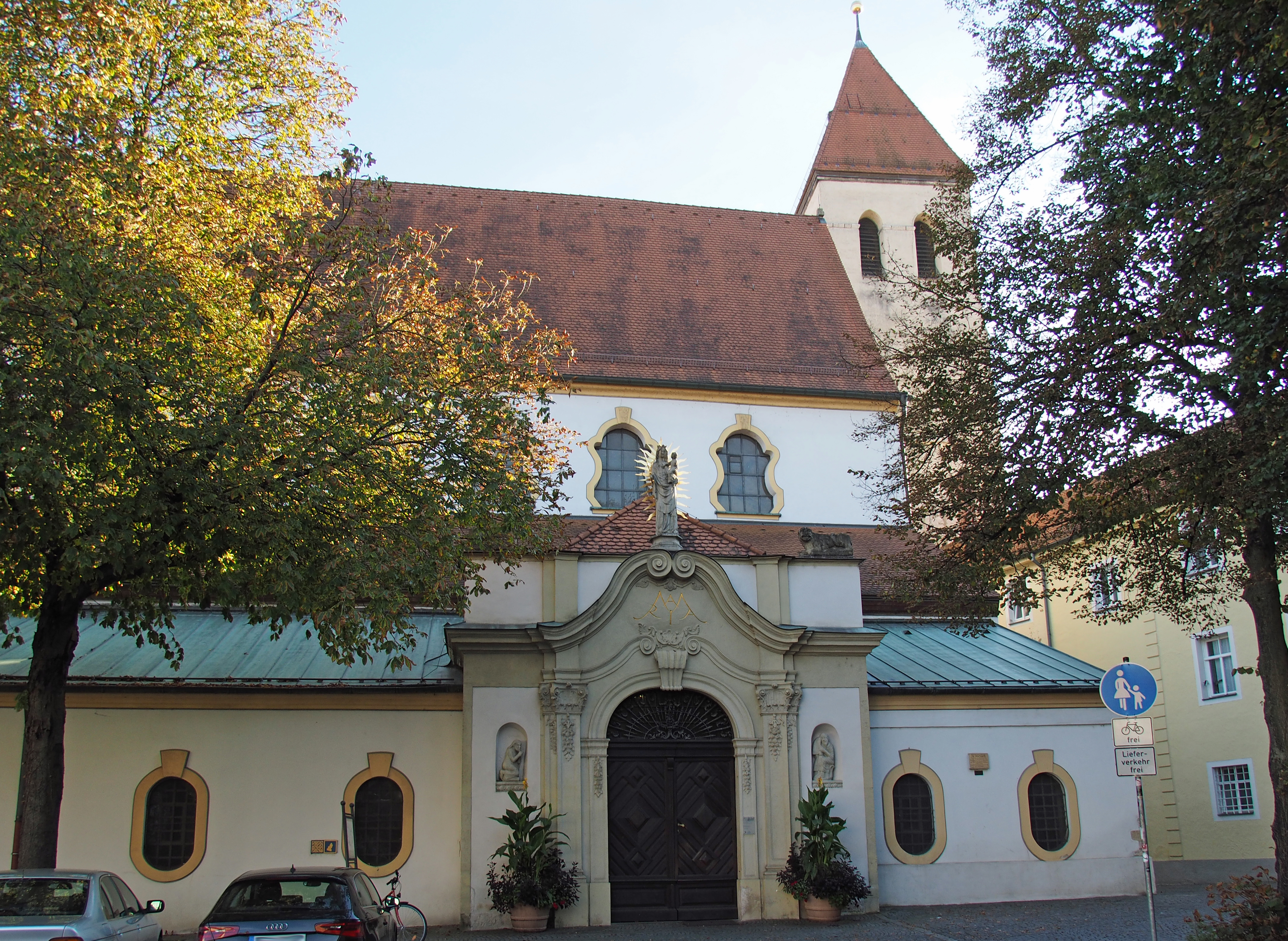 Die „Alte Kapelle“ Regensburg, Eingangsportal Nordseite